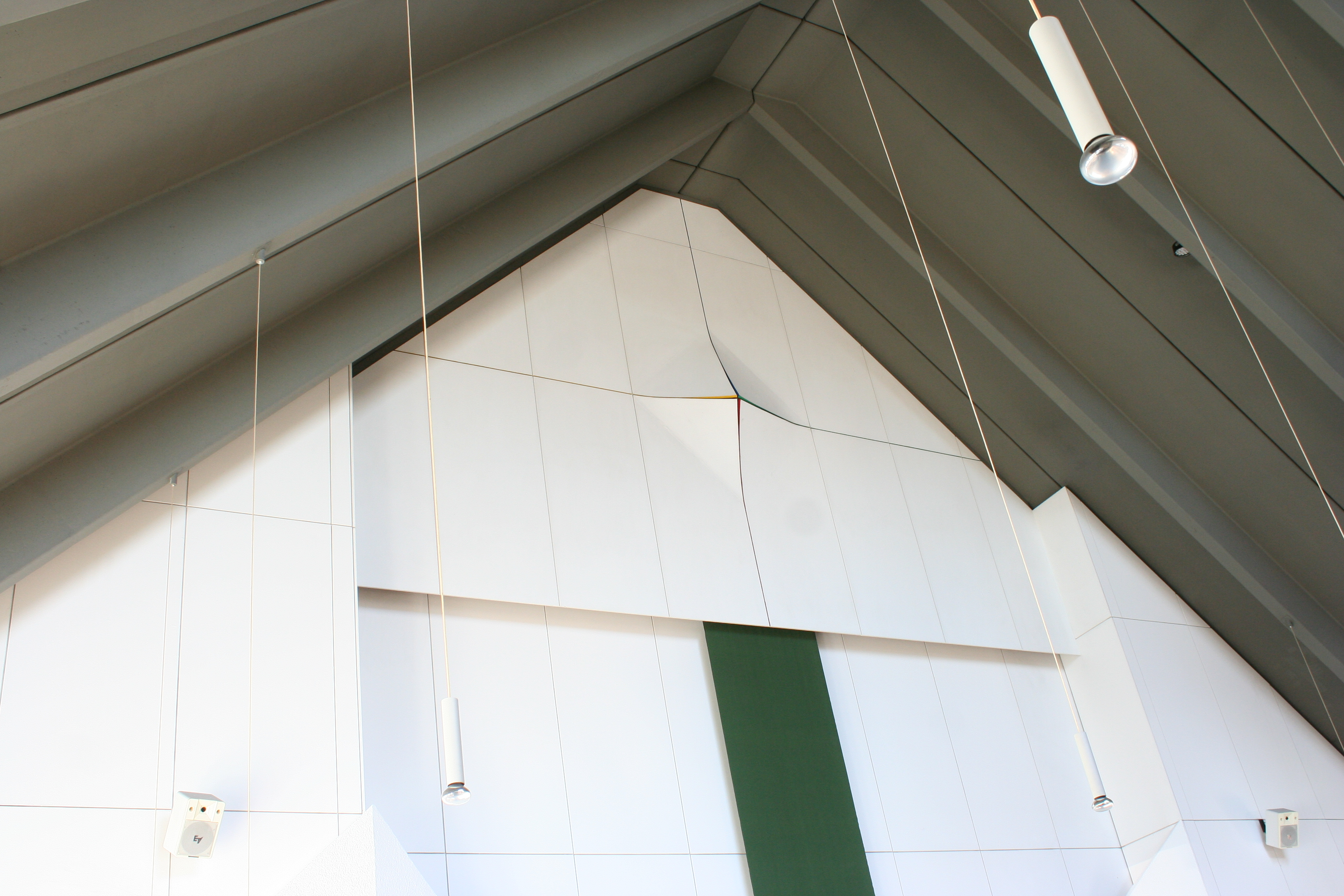 Römisch-katholische Kirche Bruder Klaus Volketswil, Gestaltung von Primo Lorenzetti